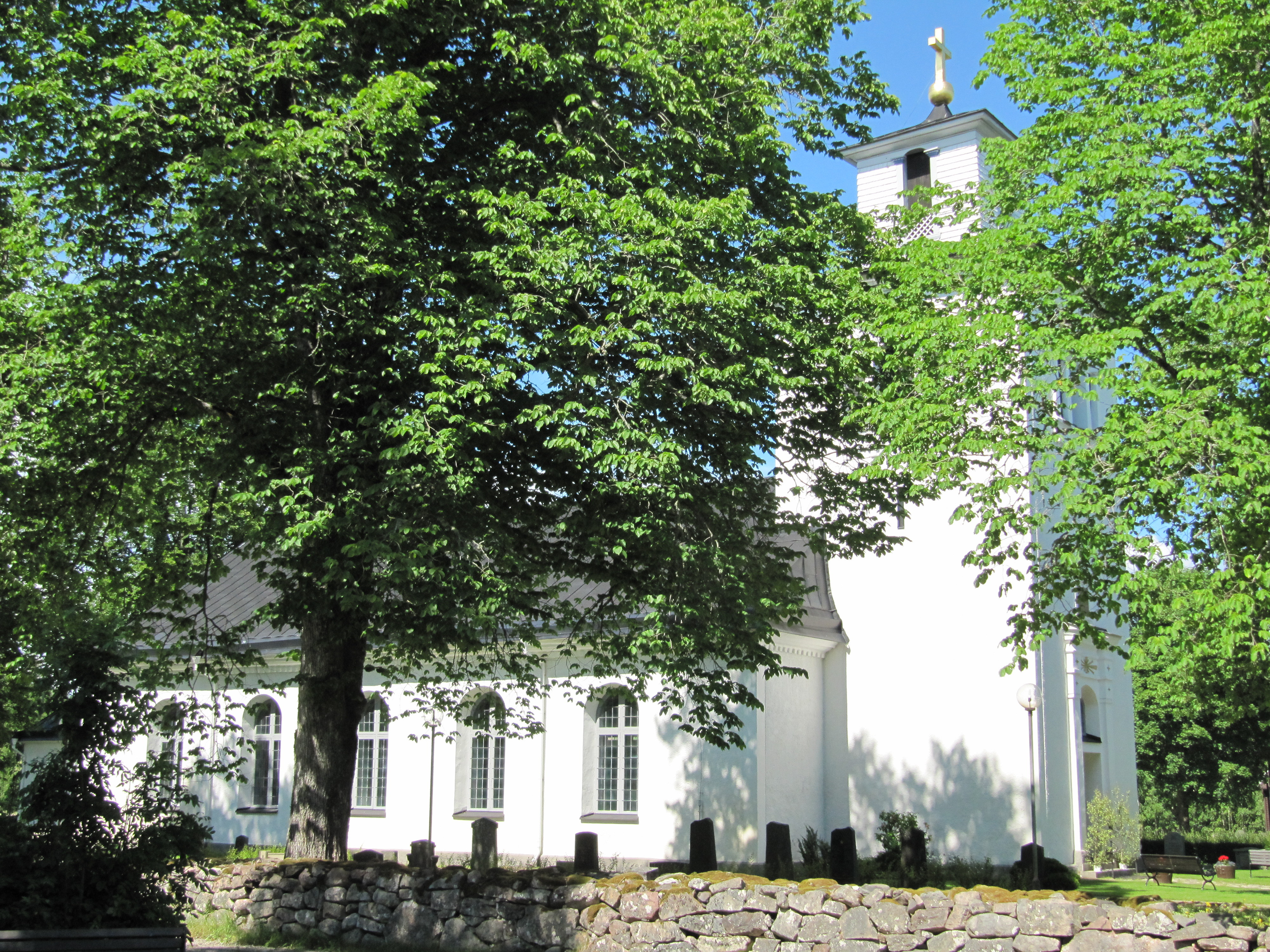 Bellö kyrka